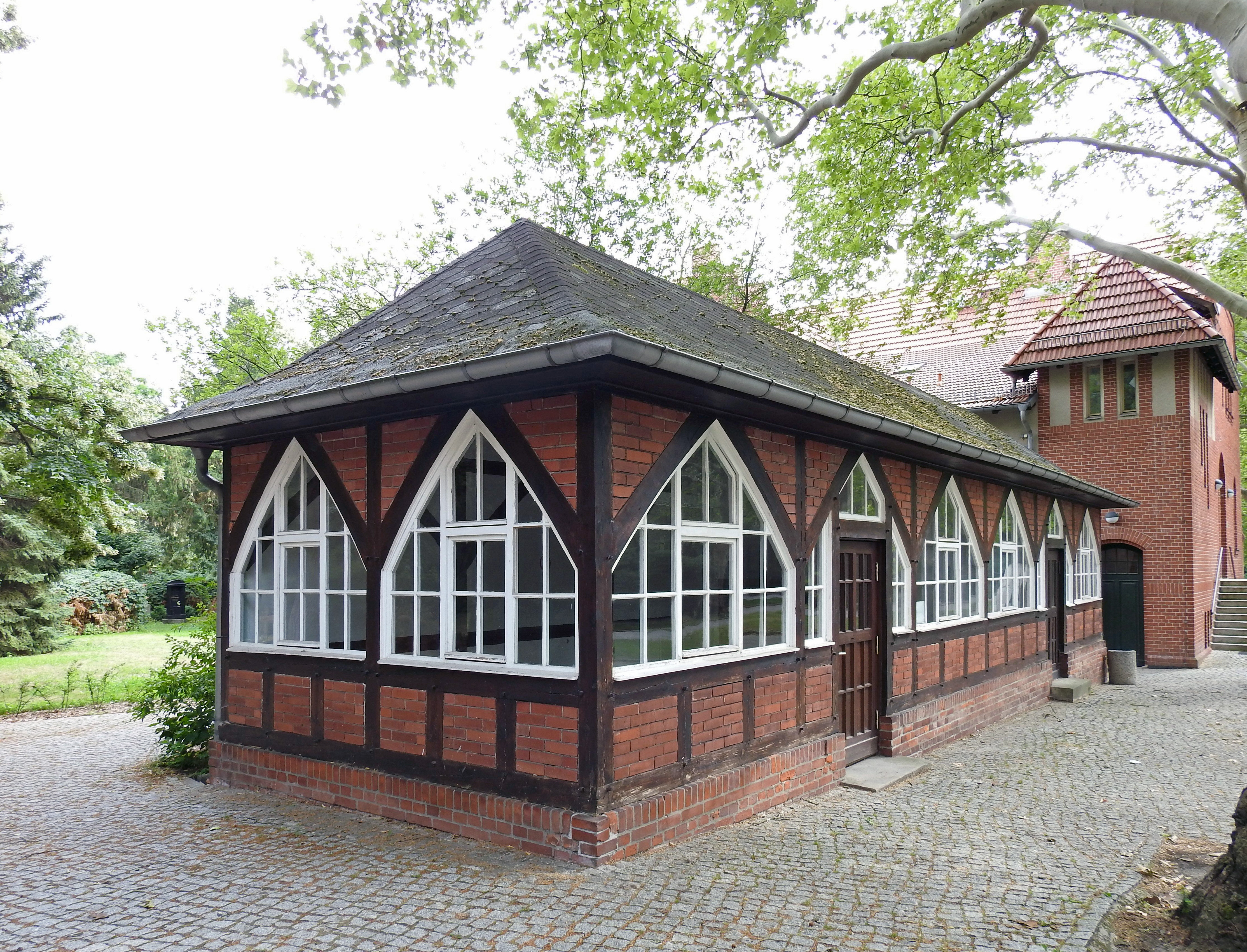 Wartesaal auf dem Berliner Friedhof Pankow III This is a photograph of an architectural monument. ,T,002